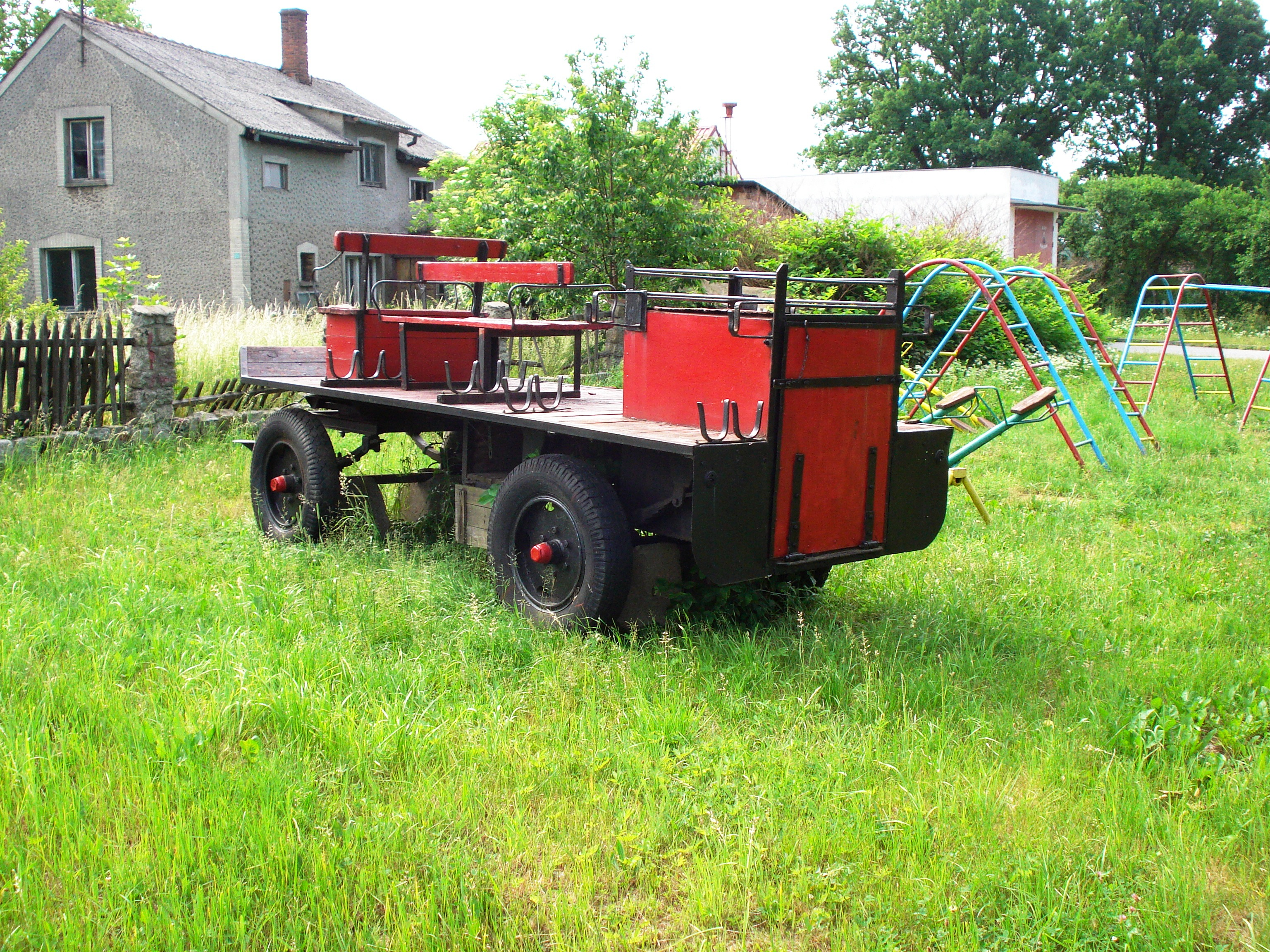 Marszów (powiat żarski). Na pierwszym planie konny wóz strażacki. W głębi siedziba Ochotniczej Straży Pożarnej.